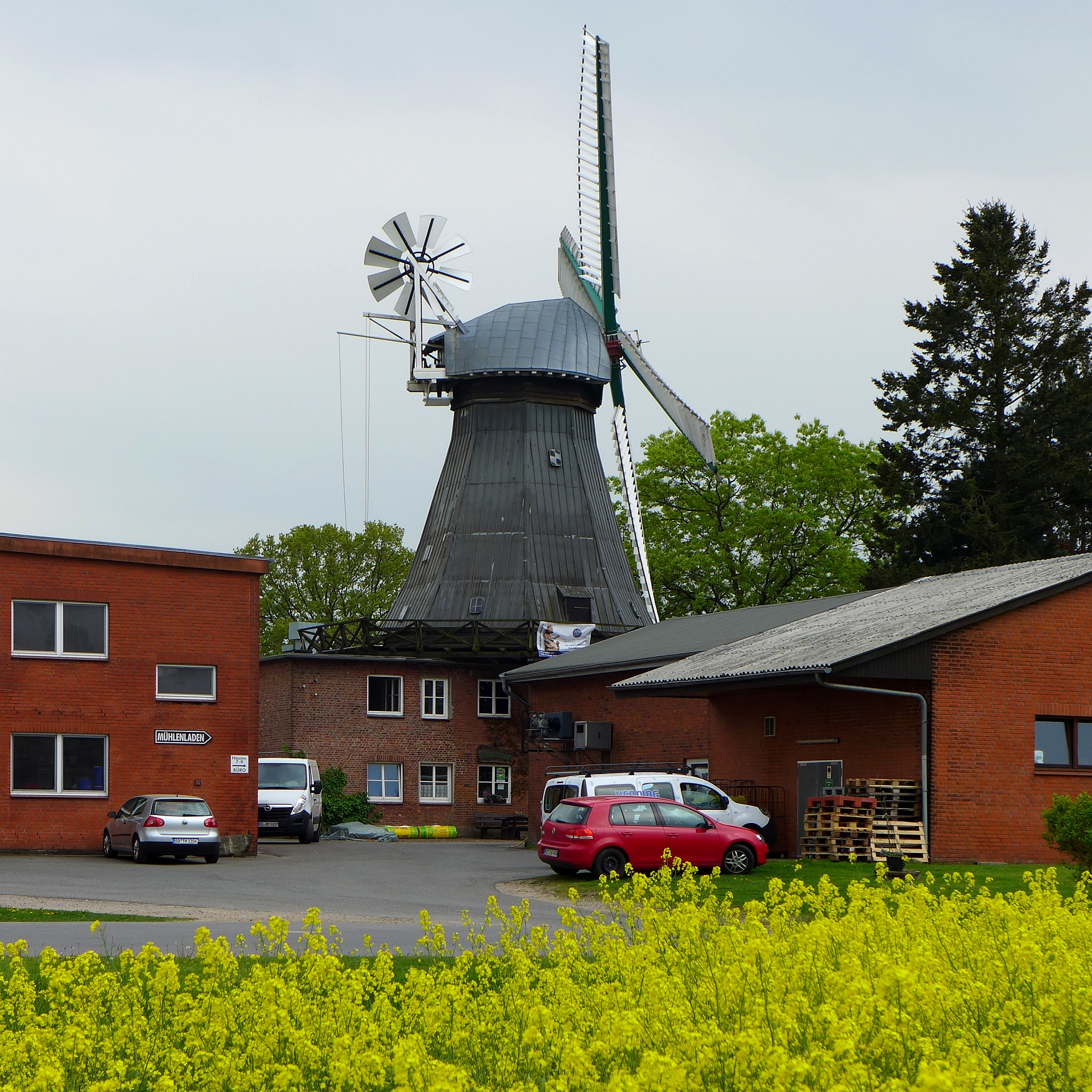 Achteckige Galerieholländer aus dem Jahre 1849, unter Denkmalschutz stehend seit 1983. Aufnahmedatum 2015-05.